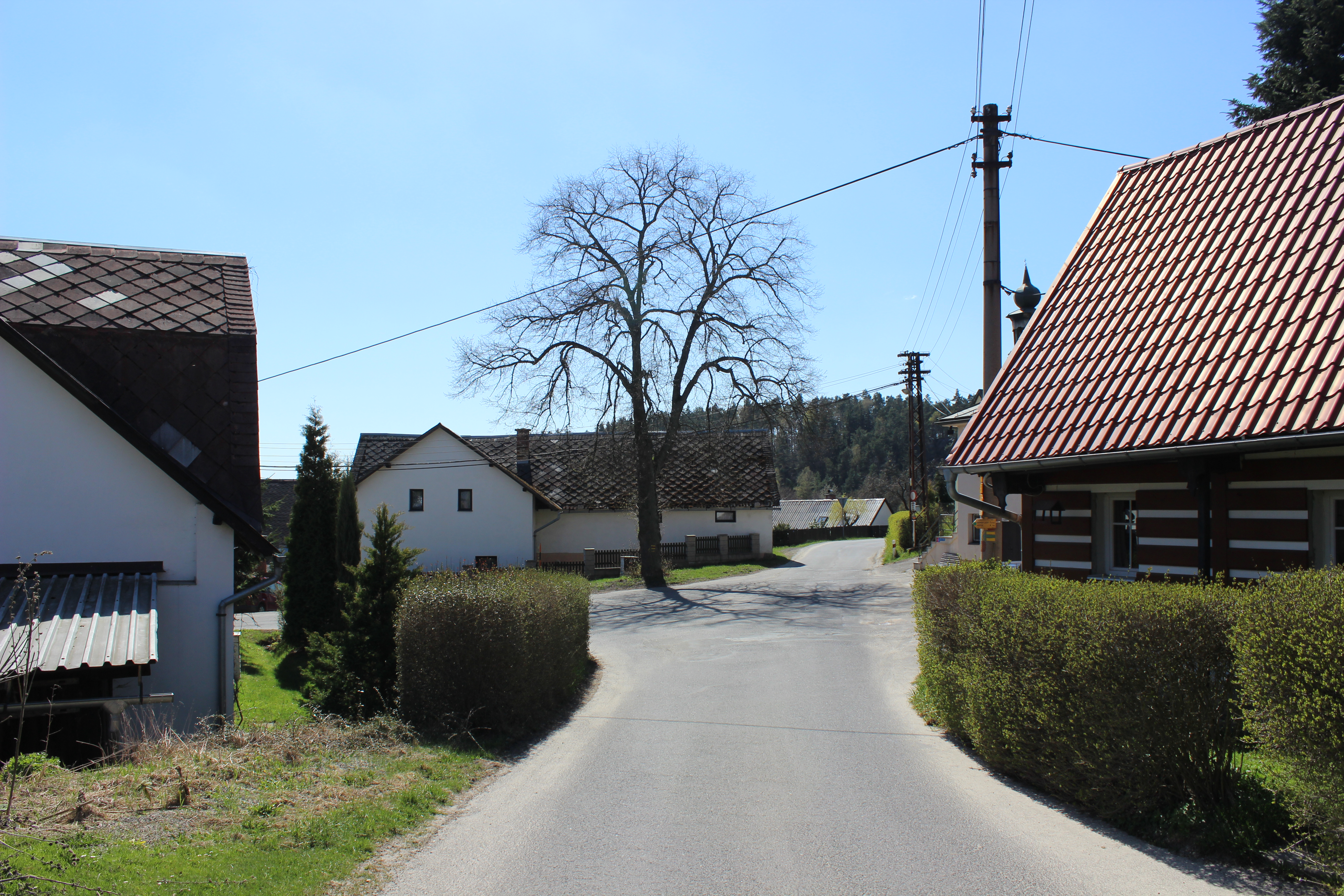 Silnice na Michovku v Besedicích, části Koberov.